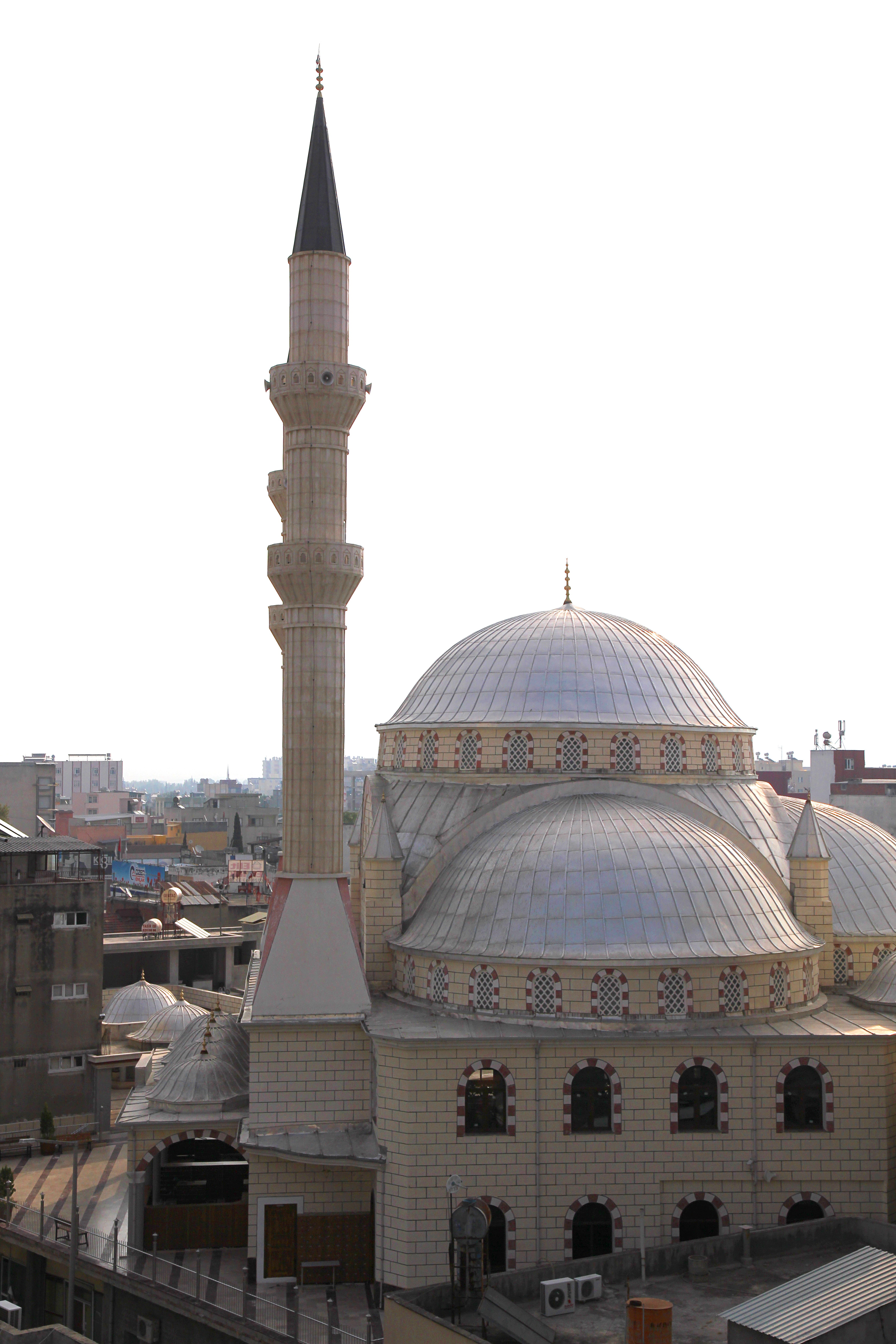 Merkez Camii (Zentralmoschee) in Osmaniye, Türkei